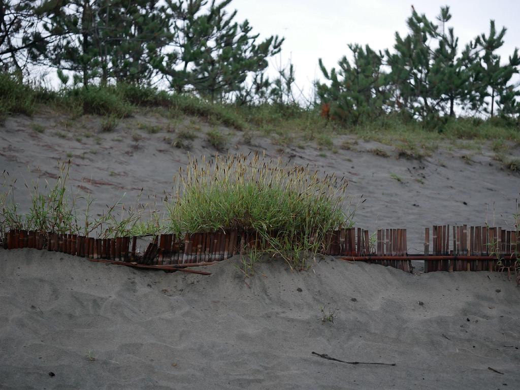 2019/09/19 静岡県：Shizuoka Pref., Japan